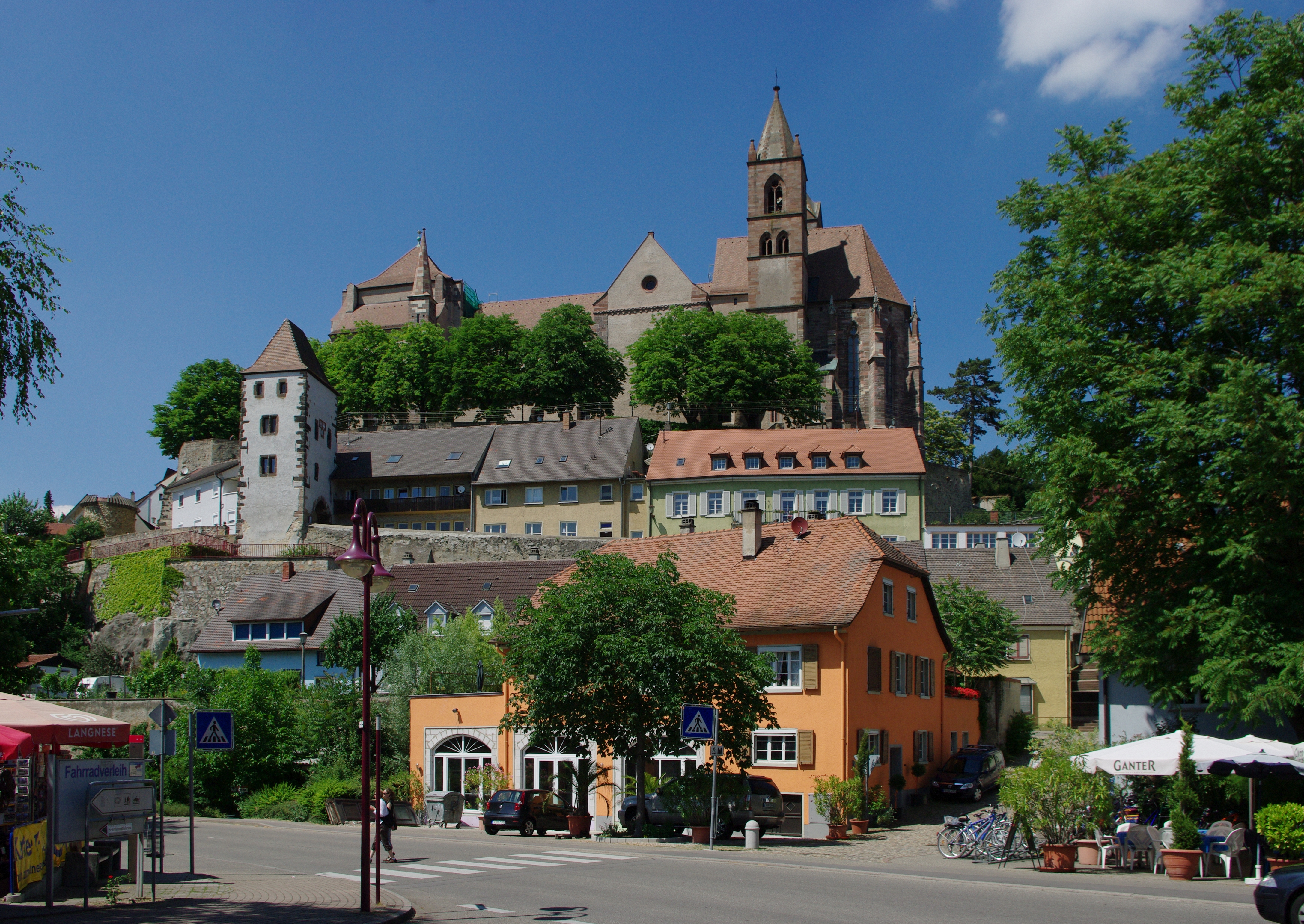 Blick auf Breisacher Münster vom Ort aus